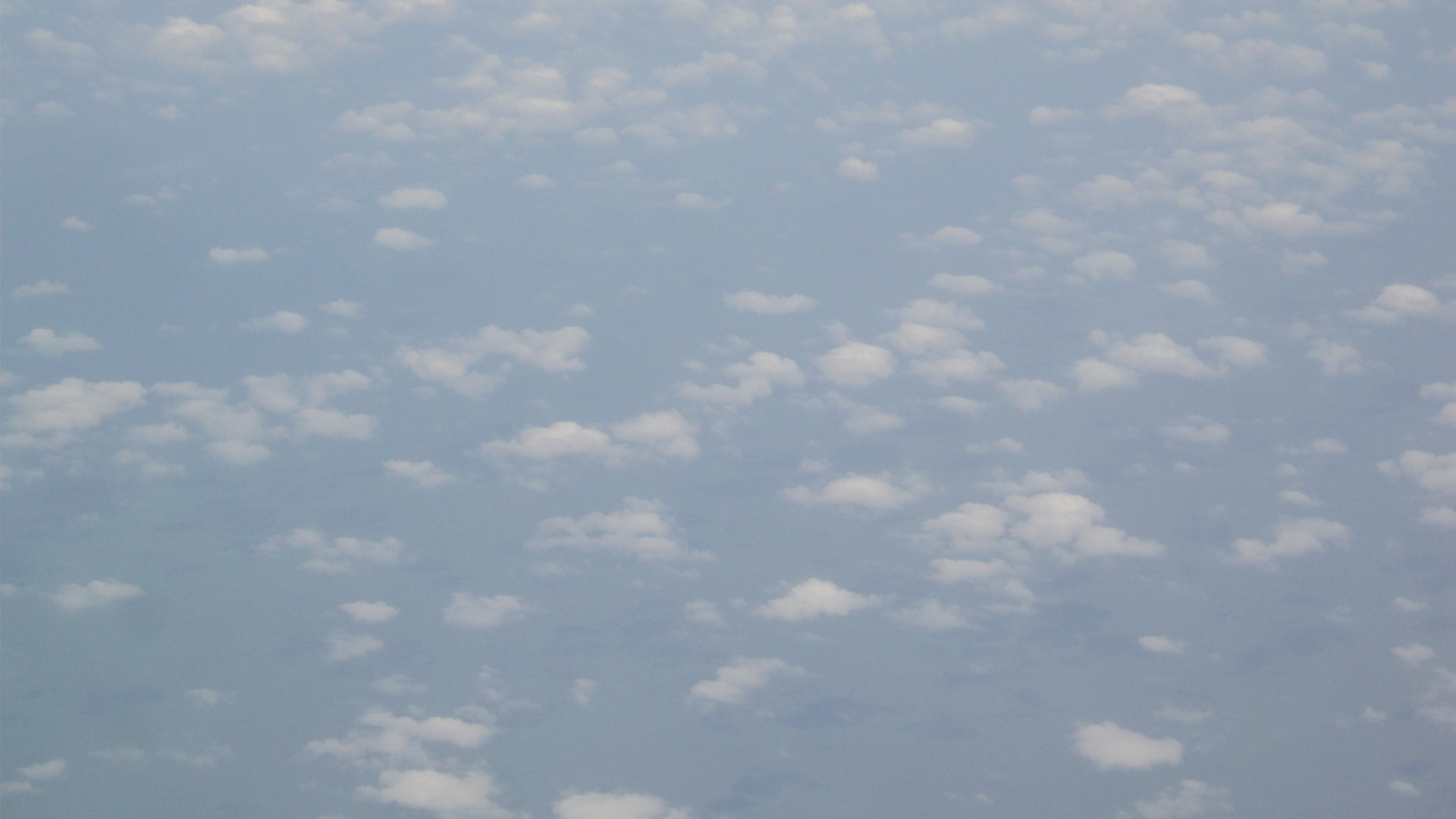 आकाशातील ढग